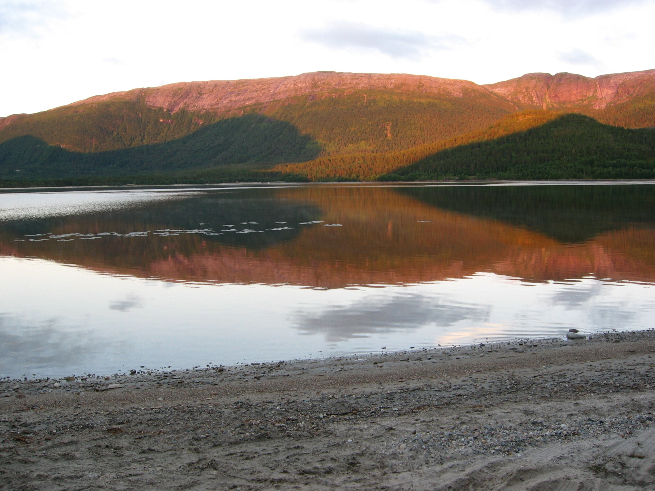 Heimsvatnet med Heimsfjellet bak. Bildet er tatt fra Kvitsanden på vestsida av vatnet.